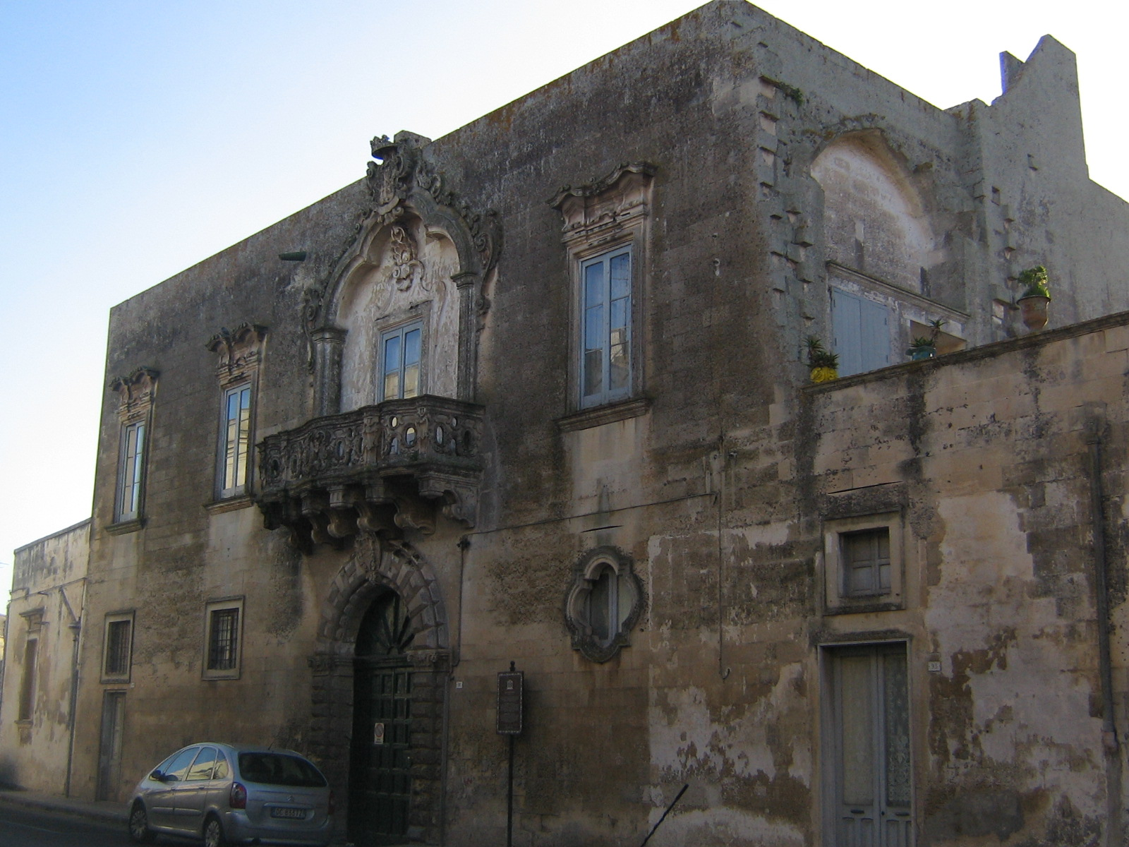 Martano Palazzo Pino